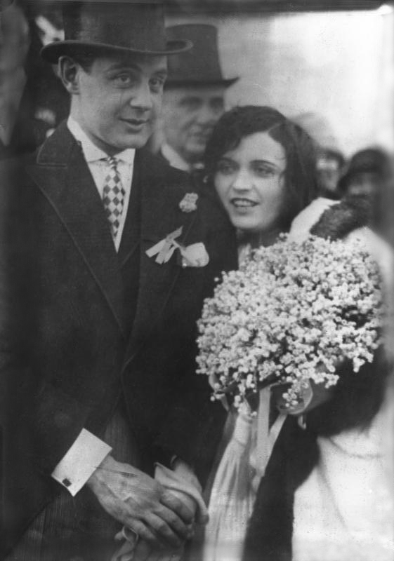 Pola Negri, die berühmte Filmschauspielerin heiratete den georgischen Fürsten Mdivani in Paris! Das glückliche Brautpaar nach der standesamtlichen Trauung in Paris. [Text auf Neuherausgabe 1930/31:] Pola Negris Gatte als Handlungsreisender! Der frühere Gatte der Film-Diva Pola Negri, der georgische Fürst Mdivani, welcher sich von seiner Gattin nun endgültig getrennt hat, ist Geschäftsreisender bei einer Pariser Juwelier-Firma geworden. Unser Bild zeigt den georgischen Fürst Mdivani mit seiner Gattin Pola Negri in glücklichen Tagen.